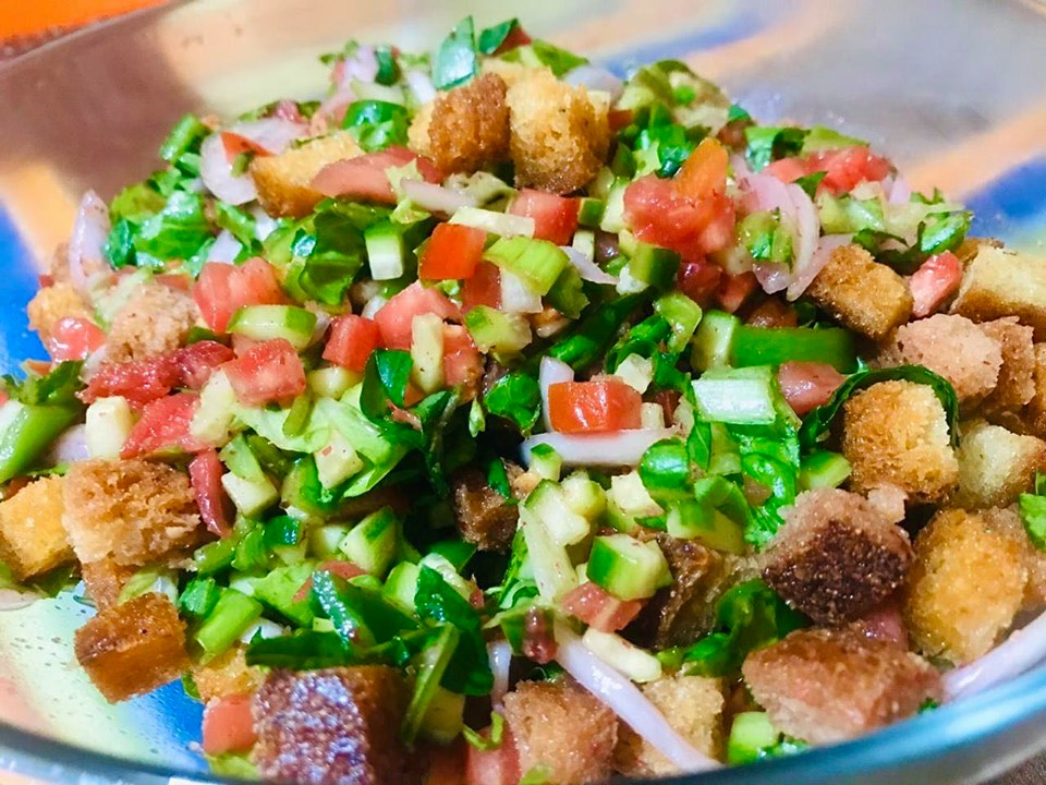 طبق لسلطة الفتوش المصنوع من خبز التوست المحمص